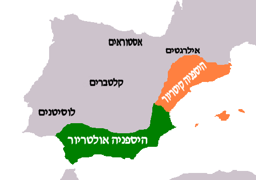 החלוקה הראשונה של היספניה לפרובינקיות רומאיות